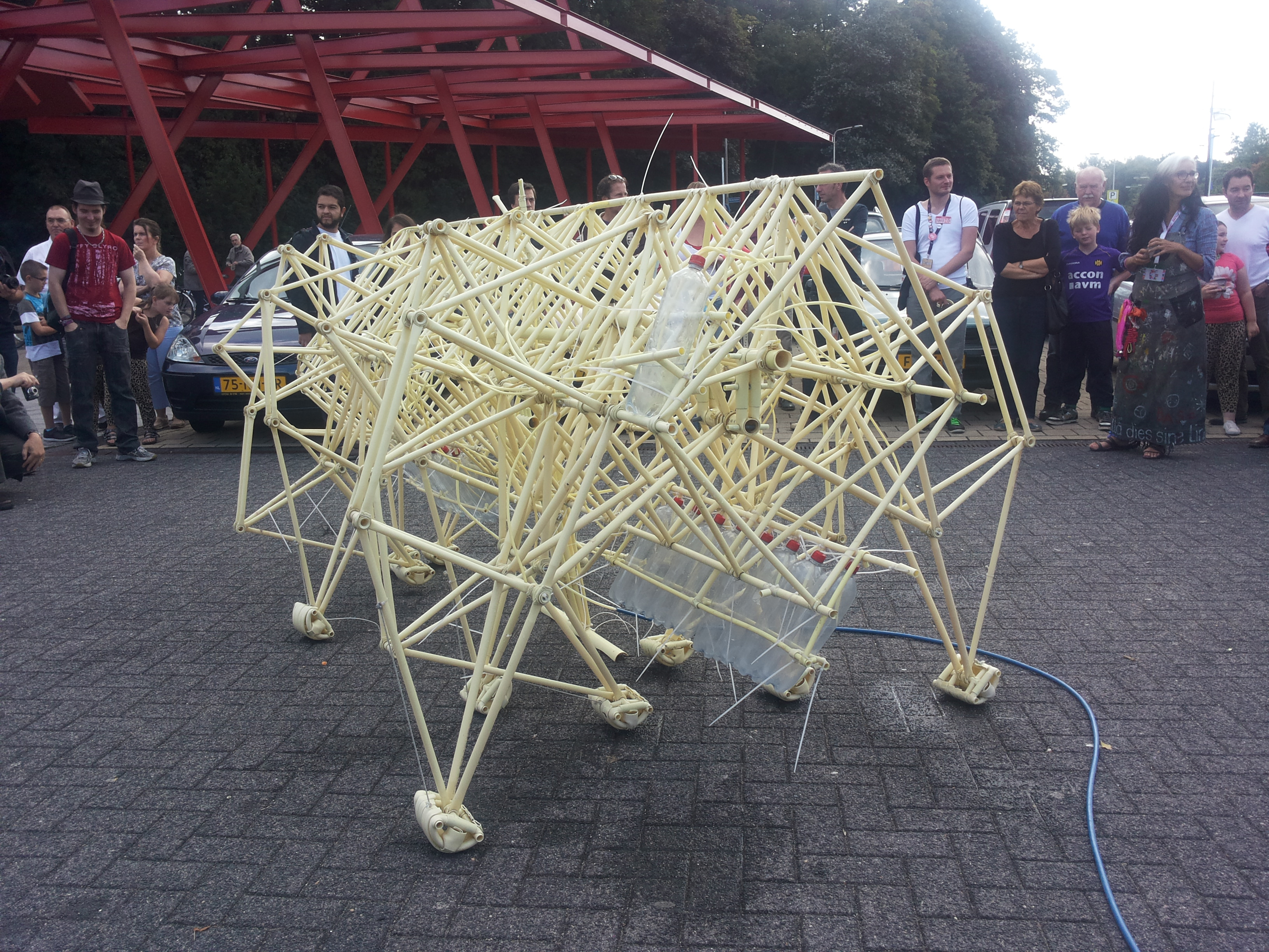 Strandbeest van Theo Jansen, te zien in Kerkrade